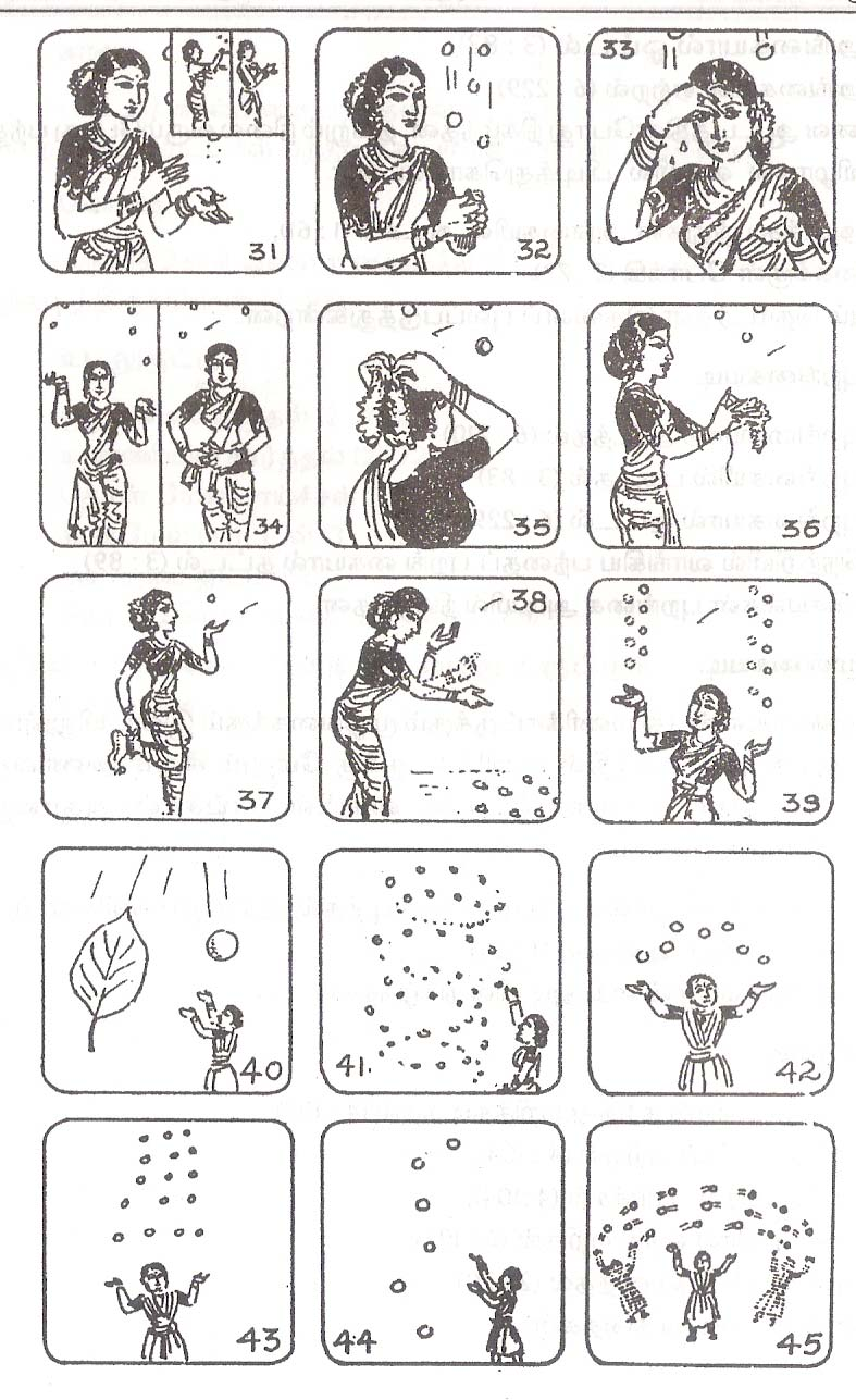 Games of India, Juggling balls, as per Perunkathai, a Tamil literature of 7th century, name of the book பழங்கால விளையாட்டுகள், author Sengai Podhuvan, published in 2002